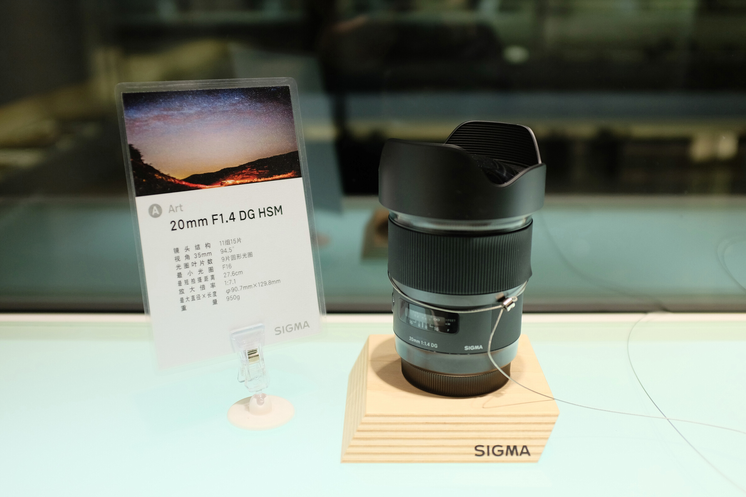 适马 ART 20mm F1.4 镜头，位于展示台上